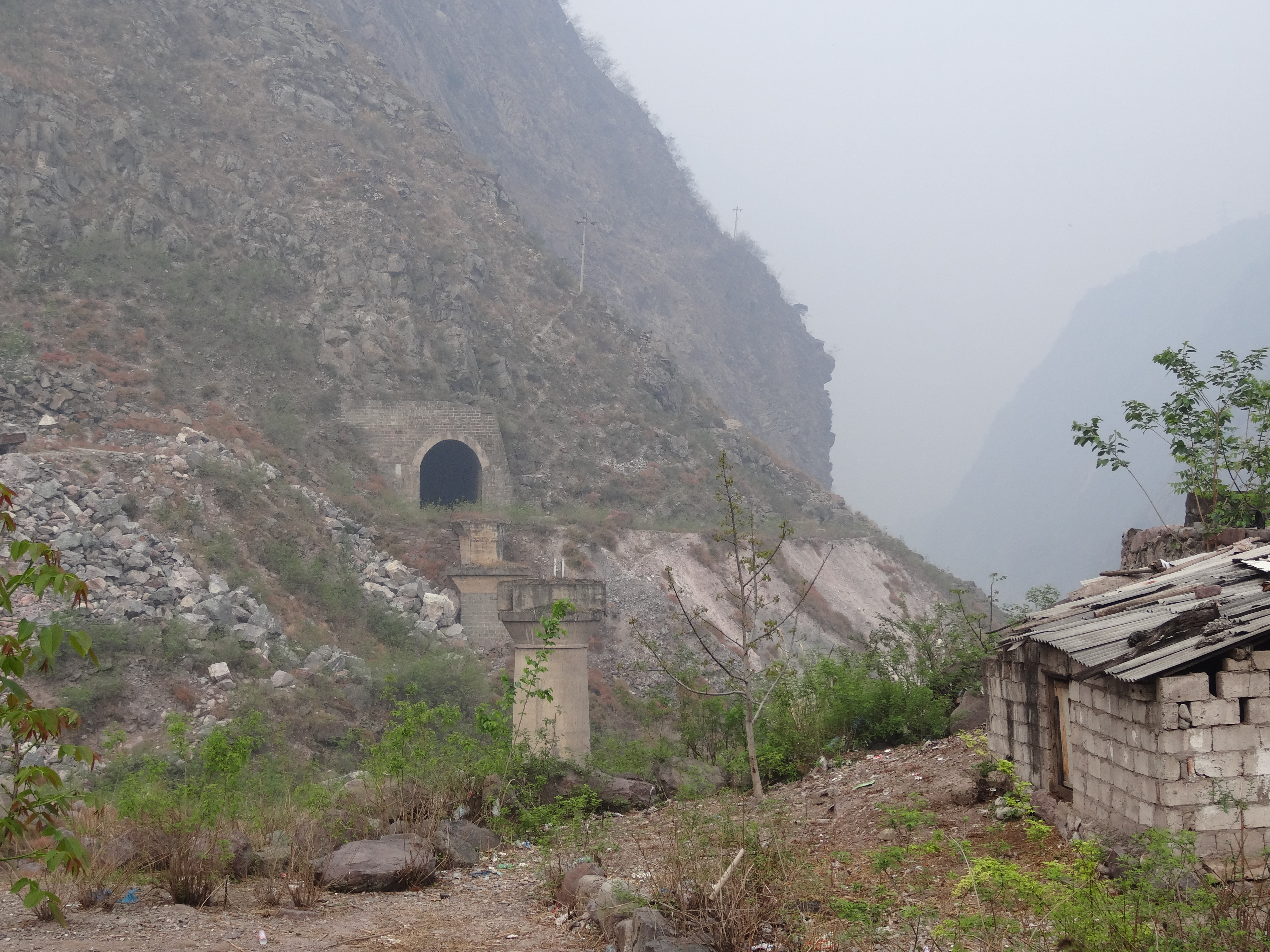 1981年成昆特大事故遗址图片 事故遗址全景